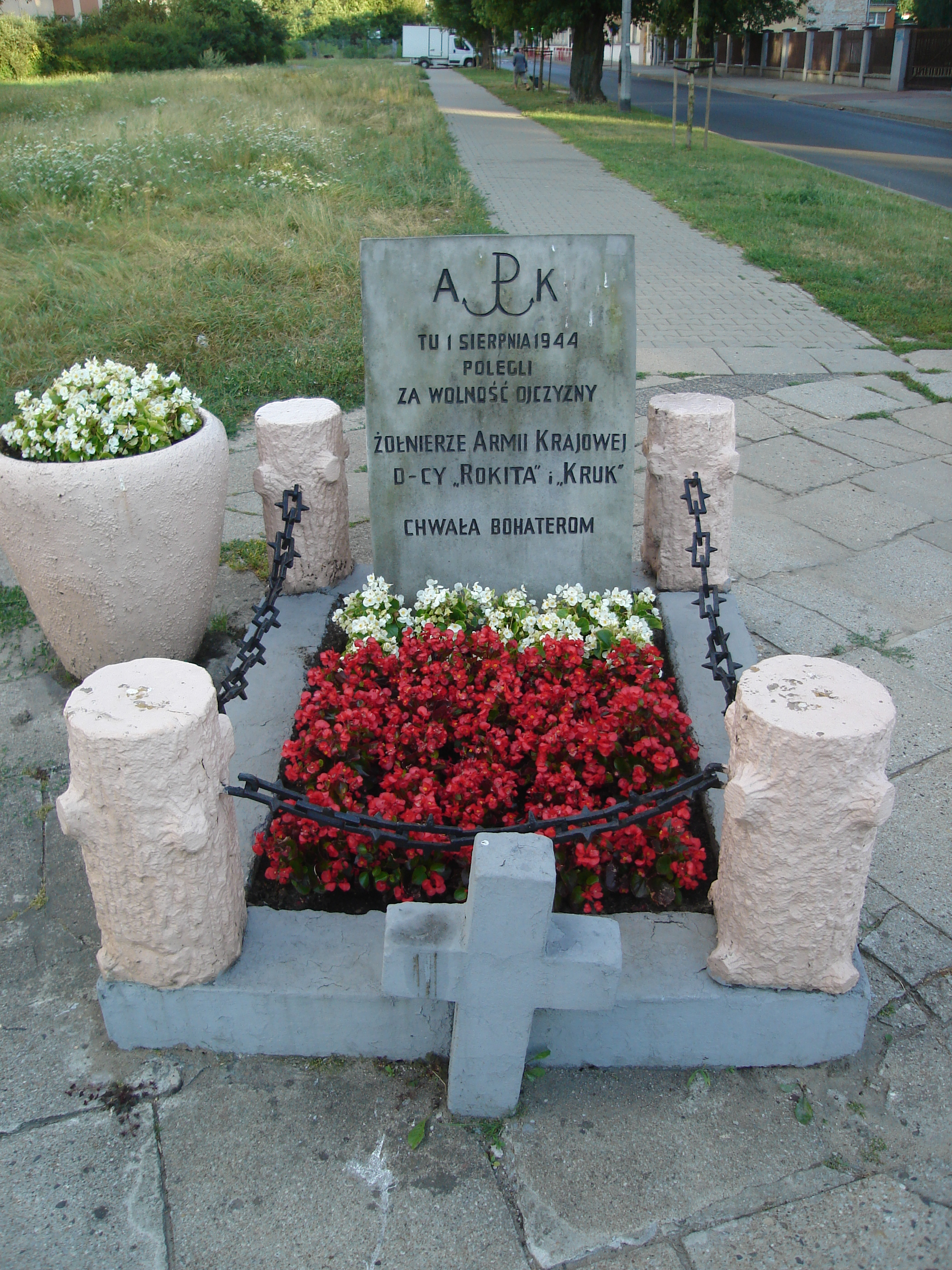 Miejsce Pamięci Narodowej na rogu ulic św Wincentego i Oszmiańskiej